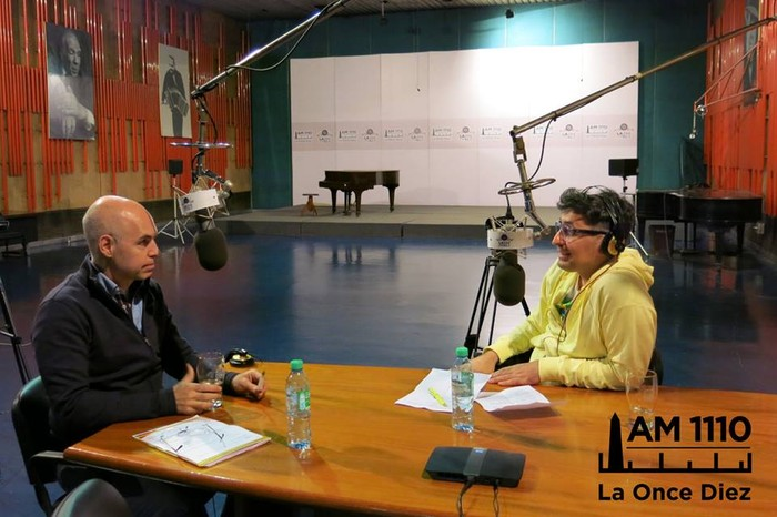 Horacio Rodríguez Larreta en los estudios de La Once Diez